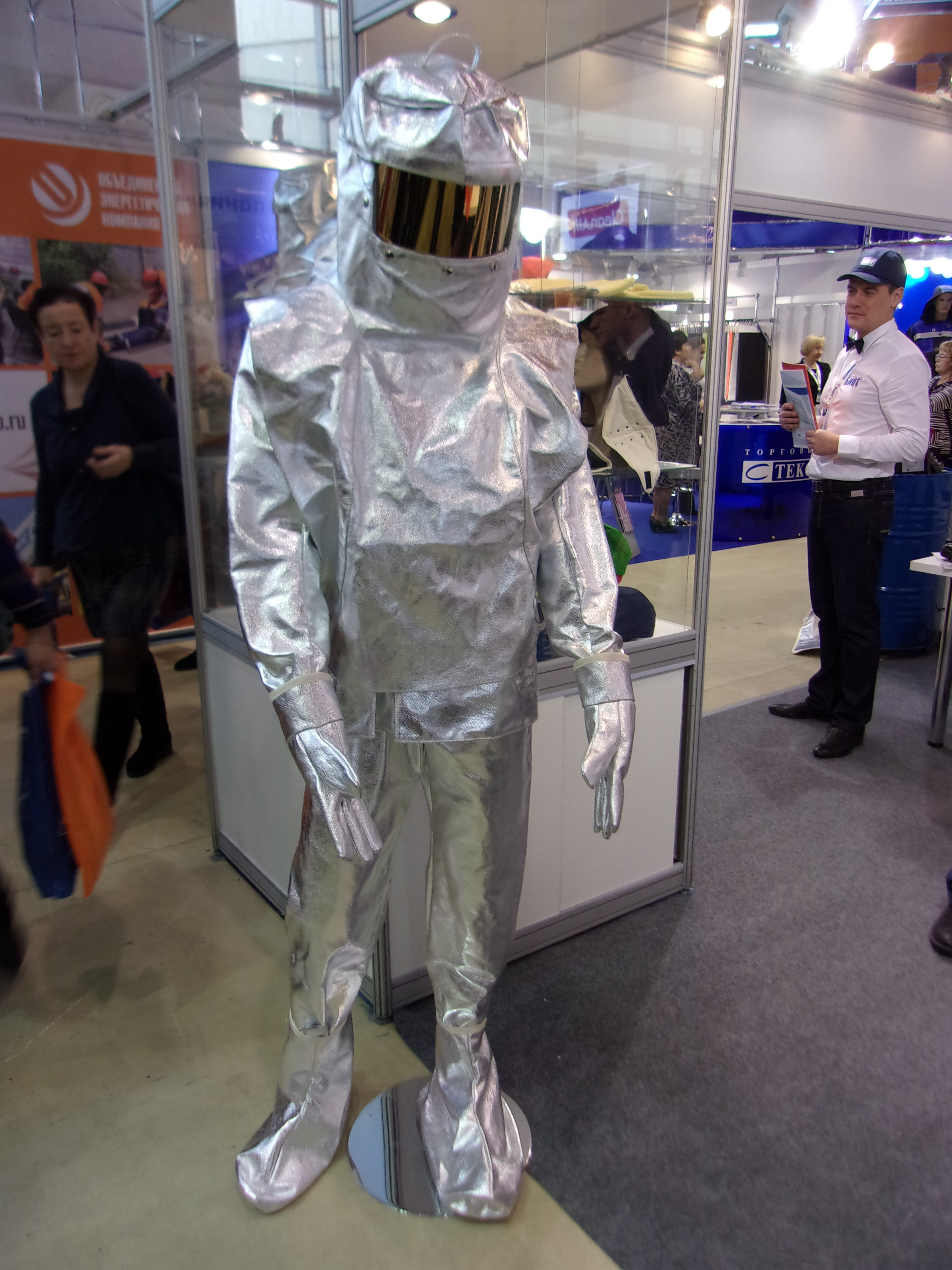 Фото с выставки Безопасность и охрана труда (Москва, 13 декабря 2016г, ВВЦ). На снимке - костюм с защитой от перегрева излучением